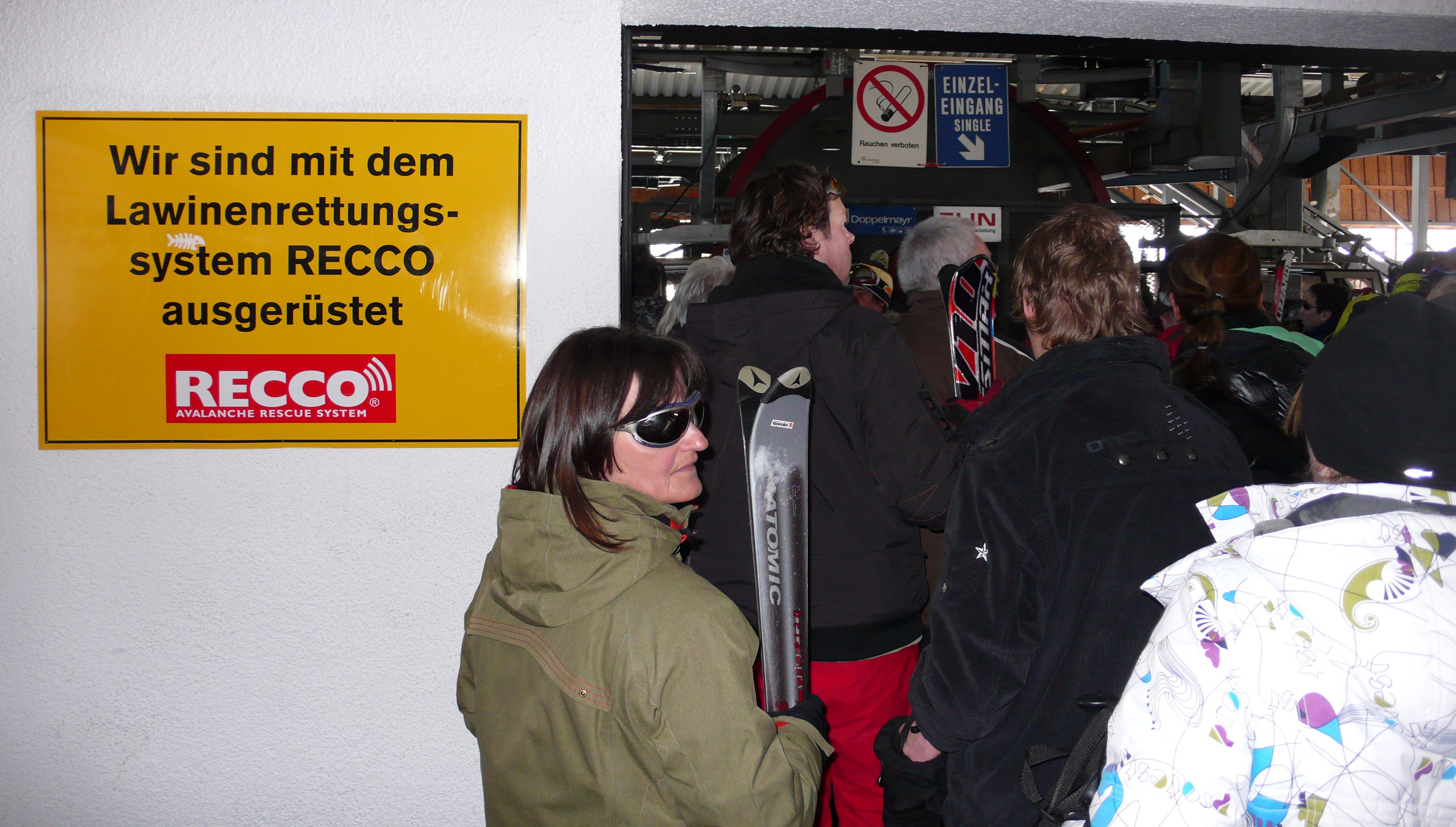 Hinweis auf das Recco System bei einer österreichischen Bergbahn.